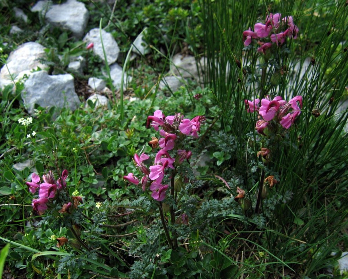 glavičasti ušivec na Zelenici - Stol.